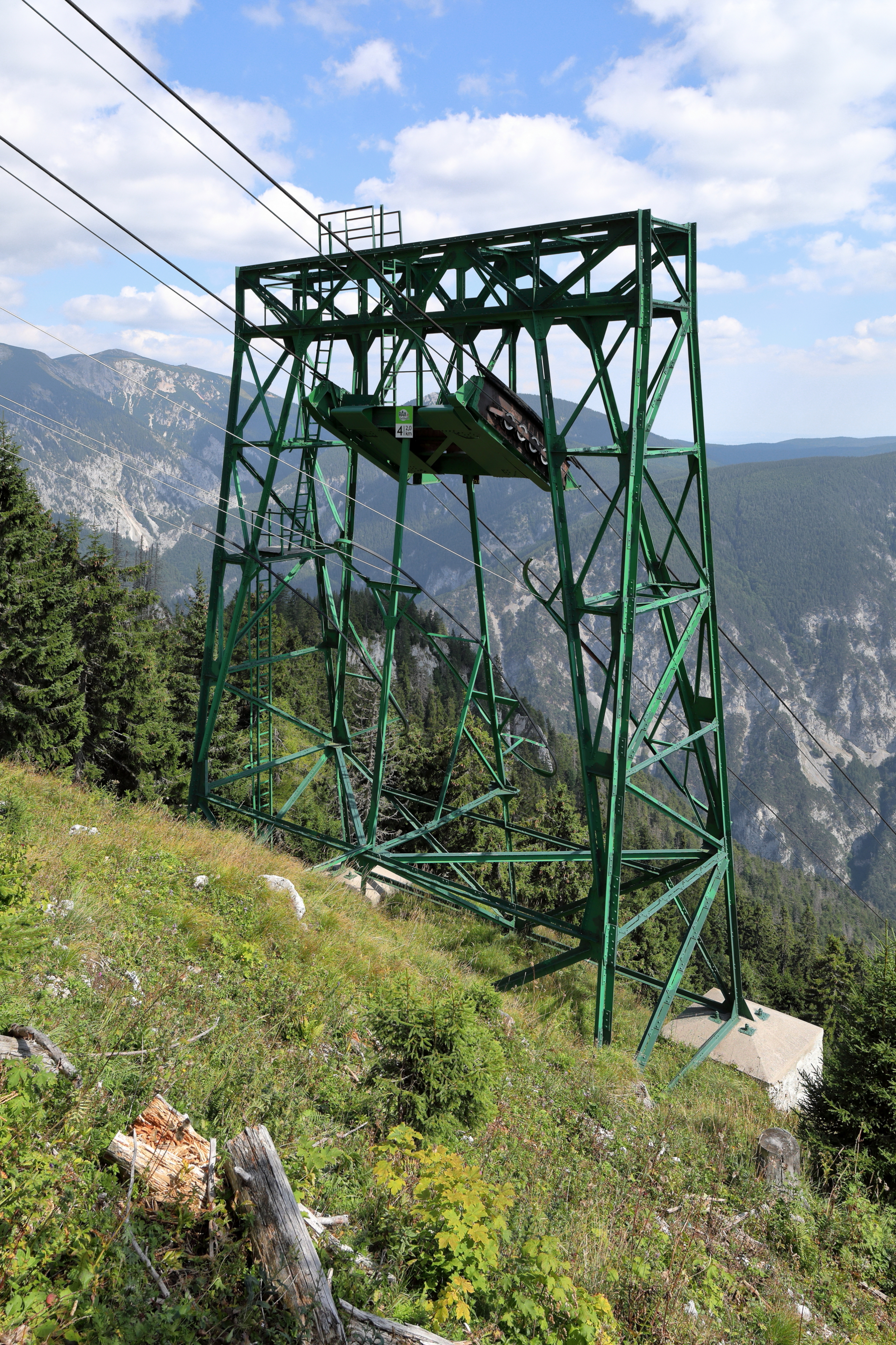 Stütze Nr. 4 der in den 1920er Jahren errichteten Rax-Seilbahn in der niederösterreichischen Marktgemeinde Reichenau an der Rax und im Hintergrund das Schneebergmassiv mit der Kaiserin-Elisabeth-Gedächtniskirche.Die älteste Personen-Seilschwebebahn der Republik Österreich hat 5 Stützen, wobei die Stützen vor den Stationen wegen der vergleichsweise geringen Spurweite als Portalstützen ausgeführt sind. Neben den Stationsgebäuden sind die Stützen die einzigen Teile, die noch original erhalten sind.